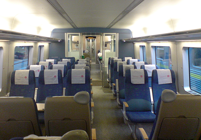 Interiör i ett av Västtrafiks Regina-tåg på Göteborgs Central.